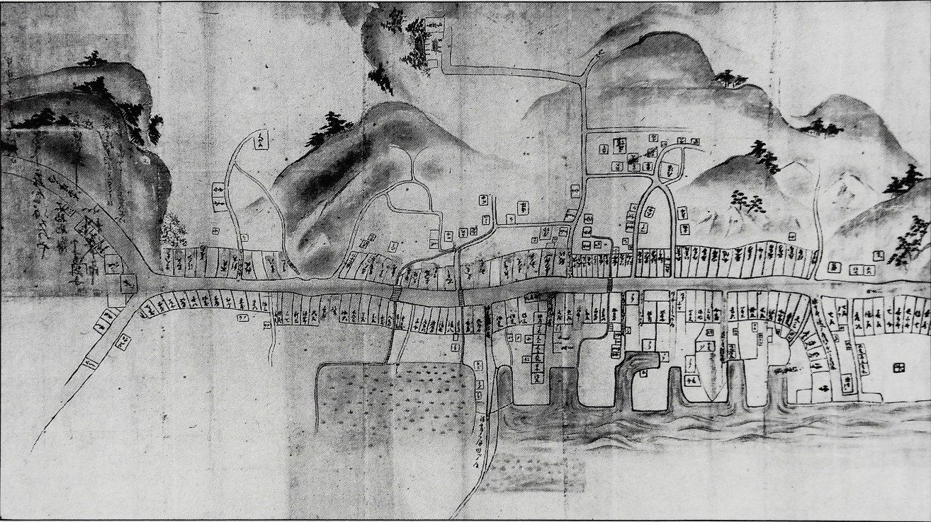 米原町絵図。6つの船入れがある。